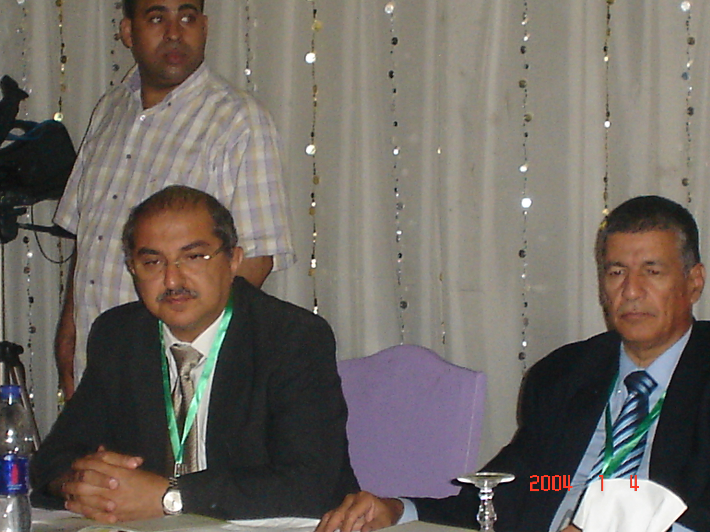 الدكتور طارق الجمال (يسار) والدكتور علي زين العابدين الخولي يرأسان إحدى جلسات المؤتمر الدولي لجراحة اليد والجراحات الميكروسكوبية بمدينة المنيا في أكتوبر 2012